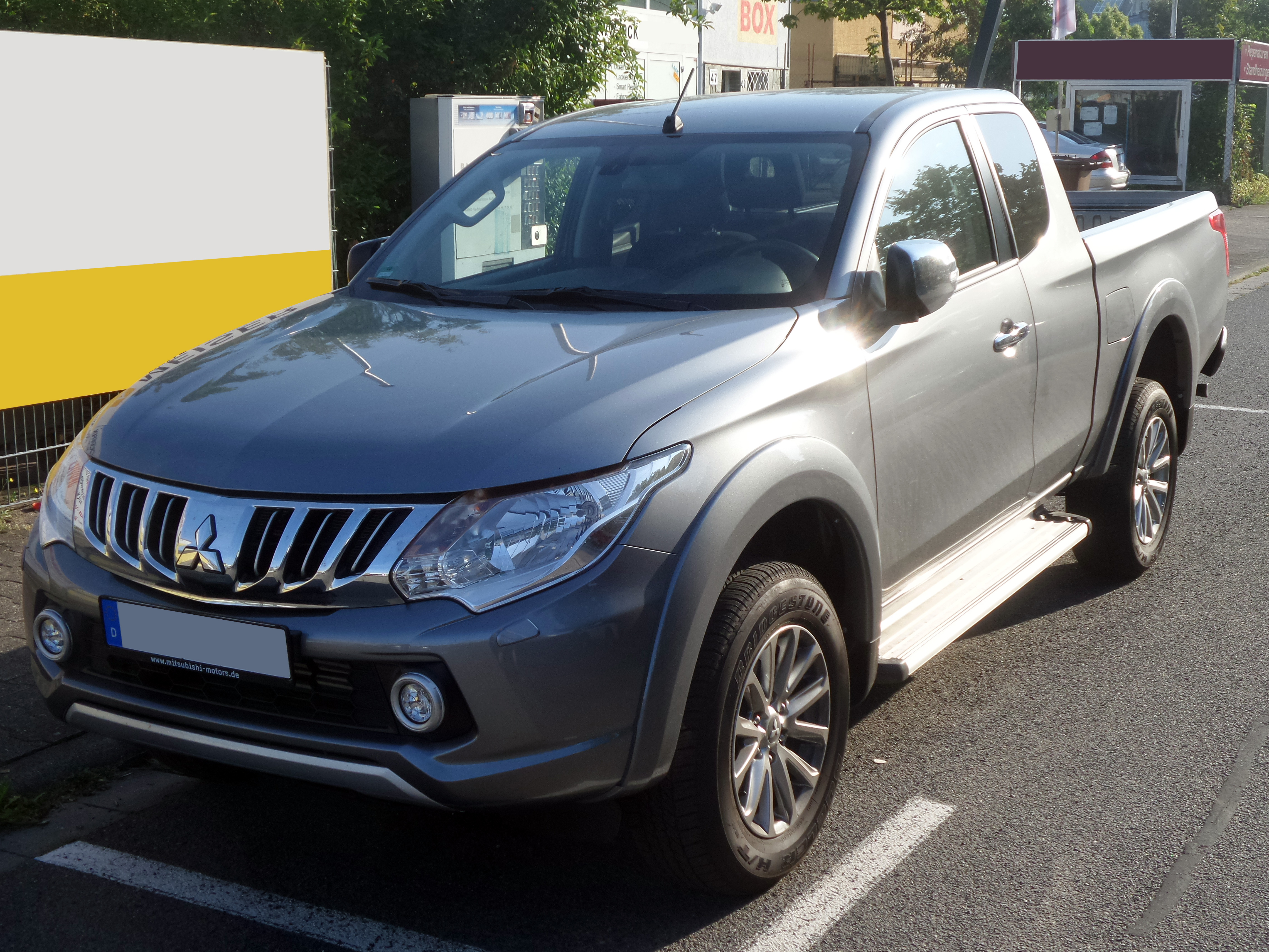 Mitsubishi L200 der 5. Generation